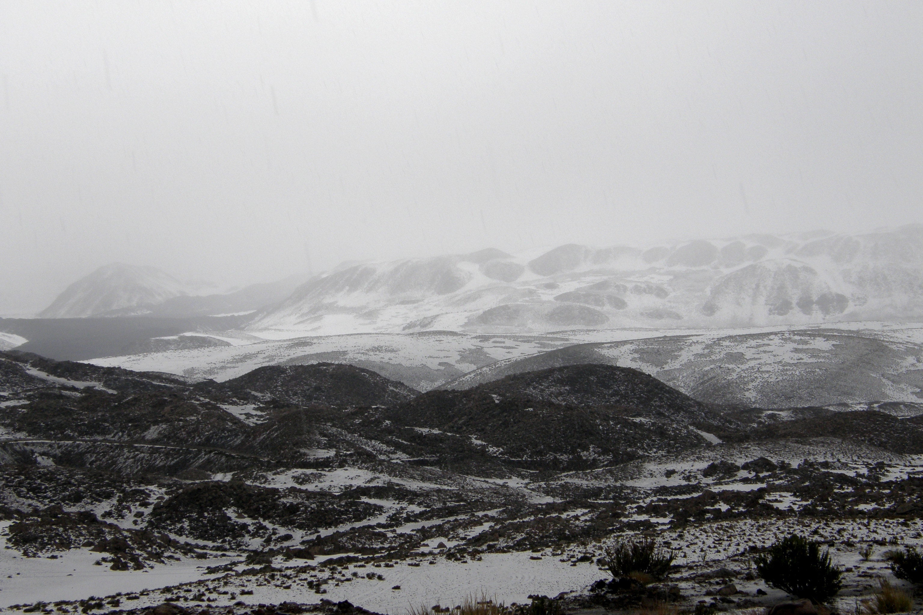 Les bords du lac Chungara sous la neige qui tombe, commune de Putre, province de Parinacota, région XV, Chili